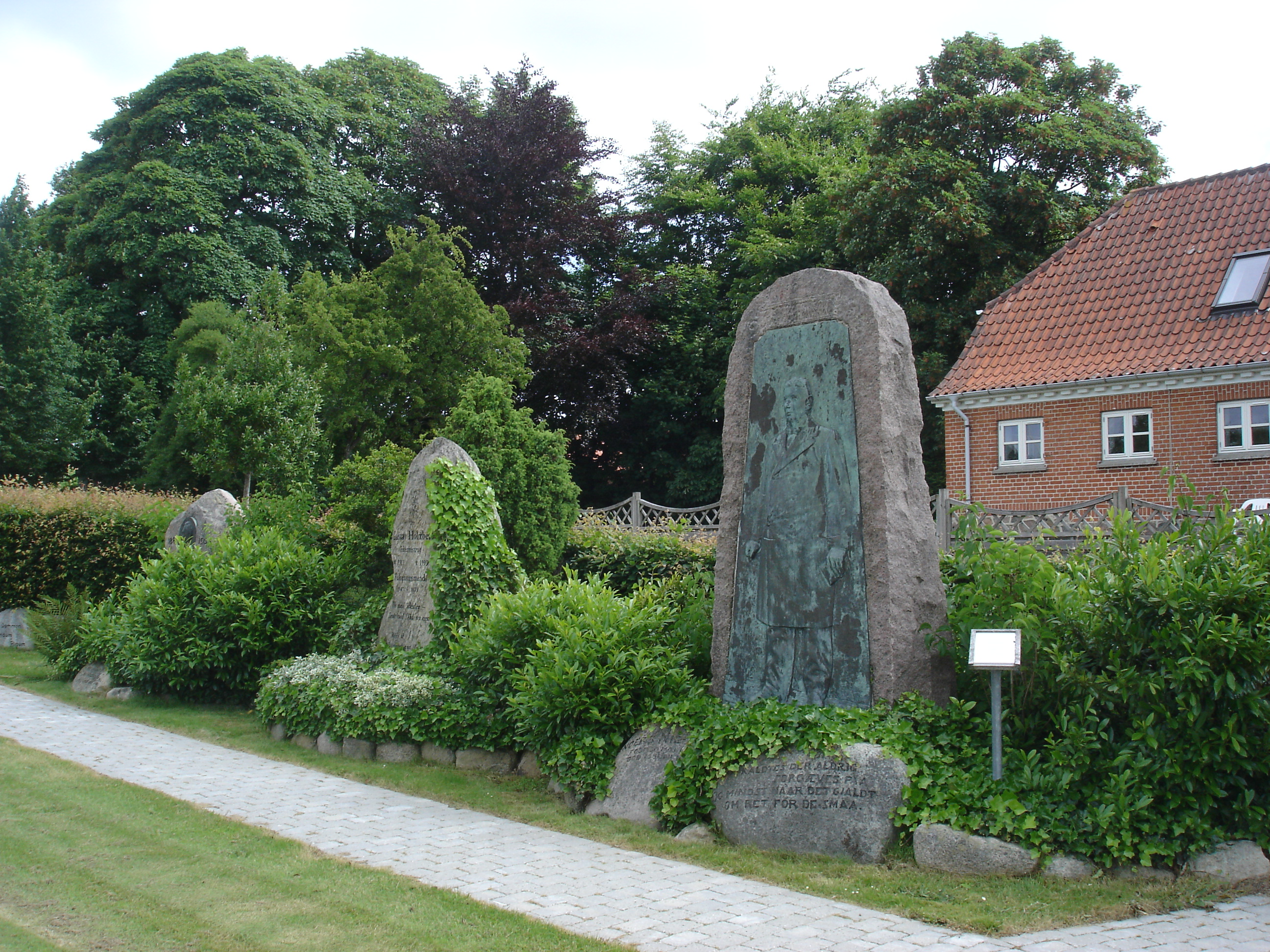 Mindesten i Mindelunden i Løvel for Løvelkredsens tre seneste folketingsmedlemmer: th. Anders Nielsen (udført af Elias Ølsgaard), tv. Laust Nørskov og i midten Gustav Holmberg